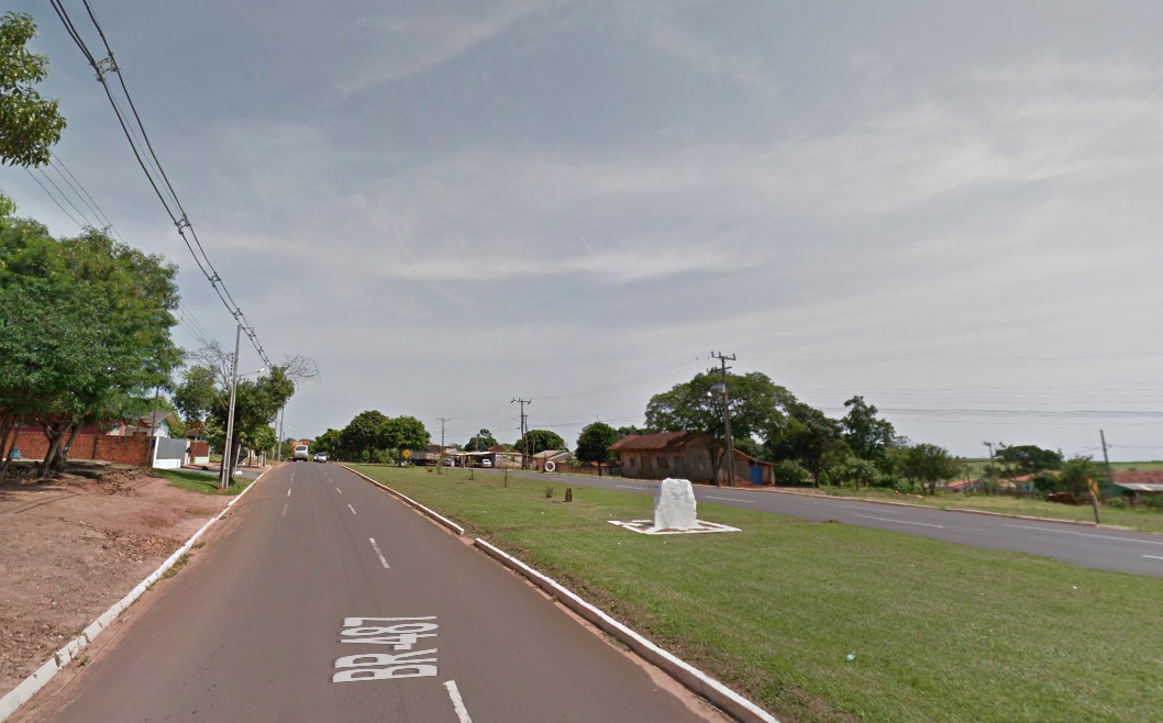 Entrada de Serra dos Dourados